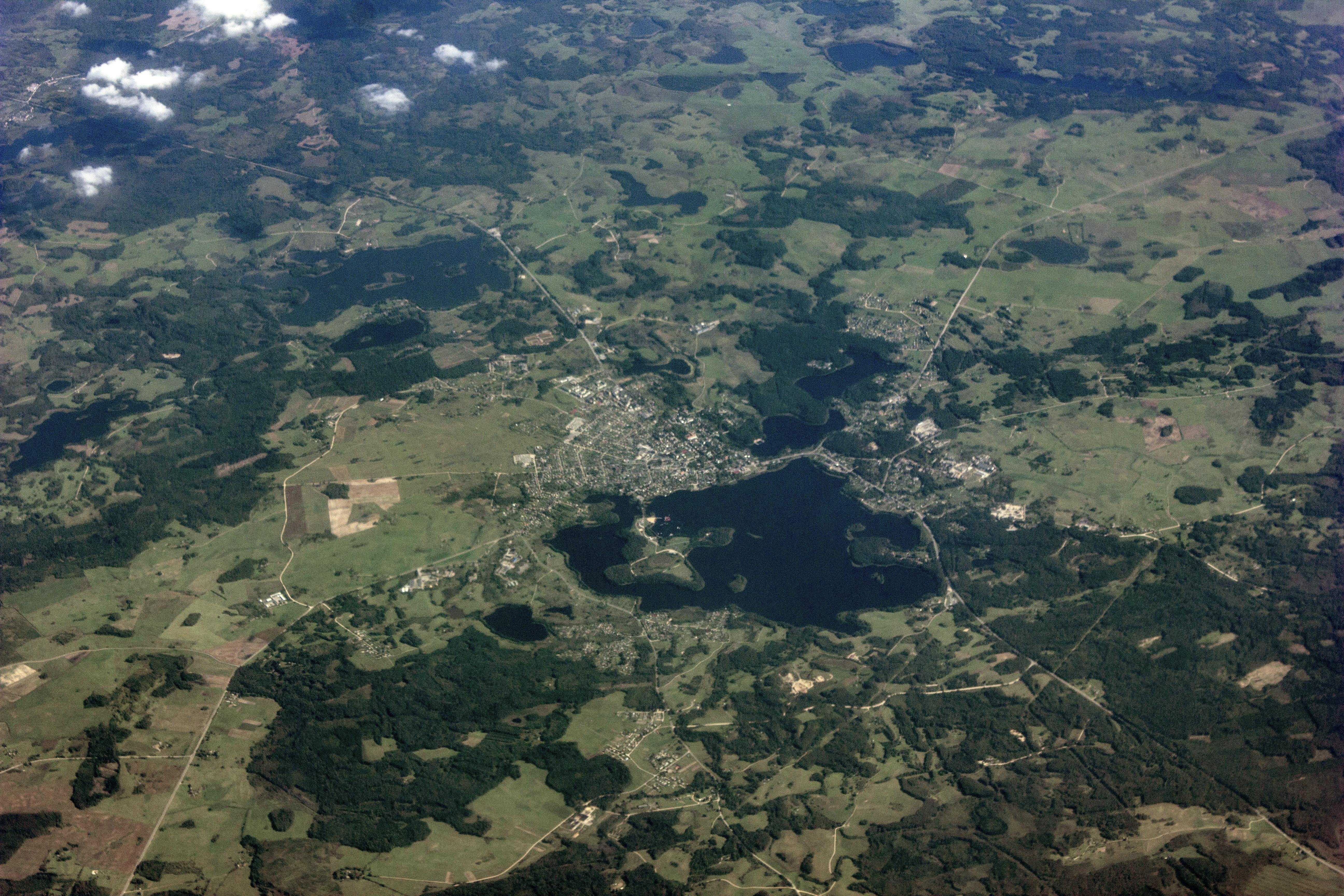 Вид с самолёта на город Зарасай, Литва